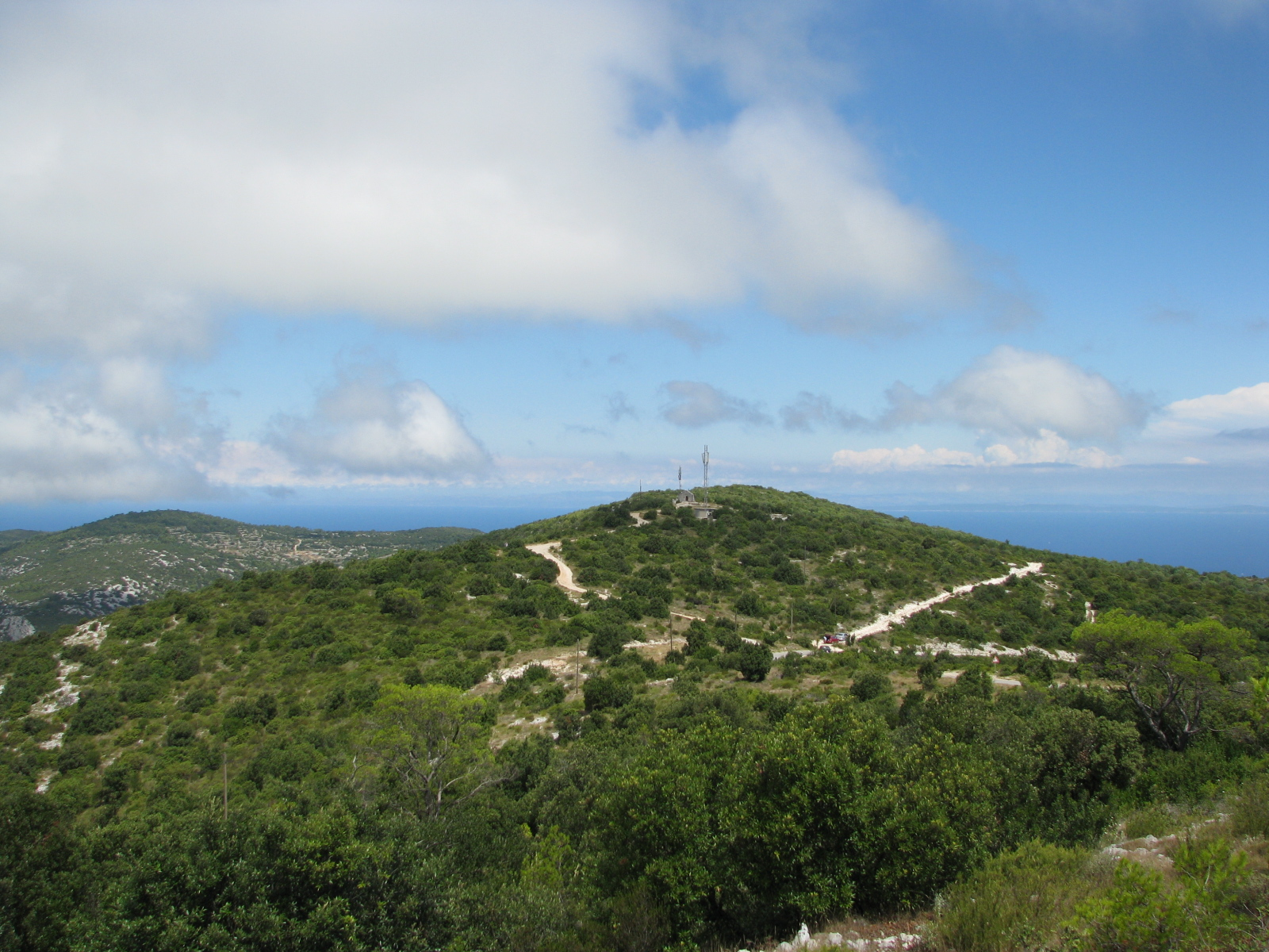 Pogled na brdo Hum, najviša točka otoka Visa